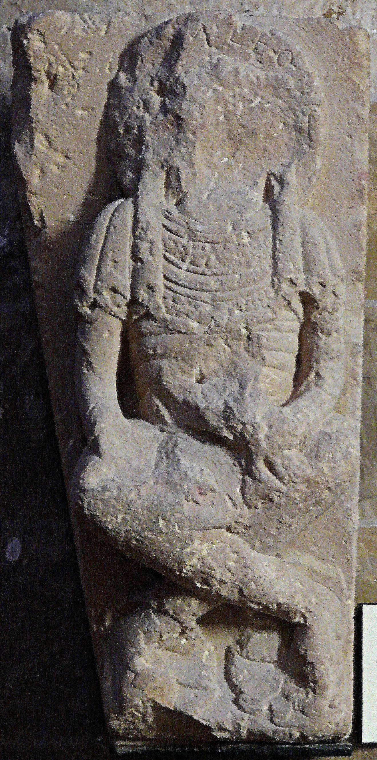 Nogaro - Collégiale Saint-Nicolas - Signum Leonis